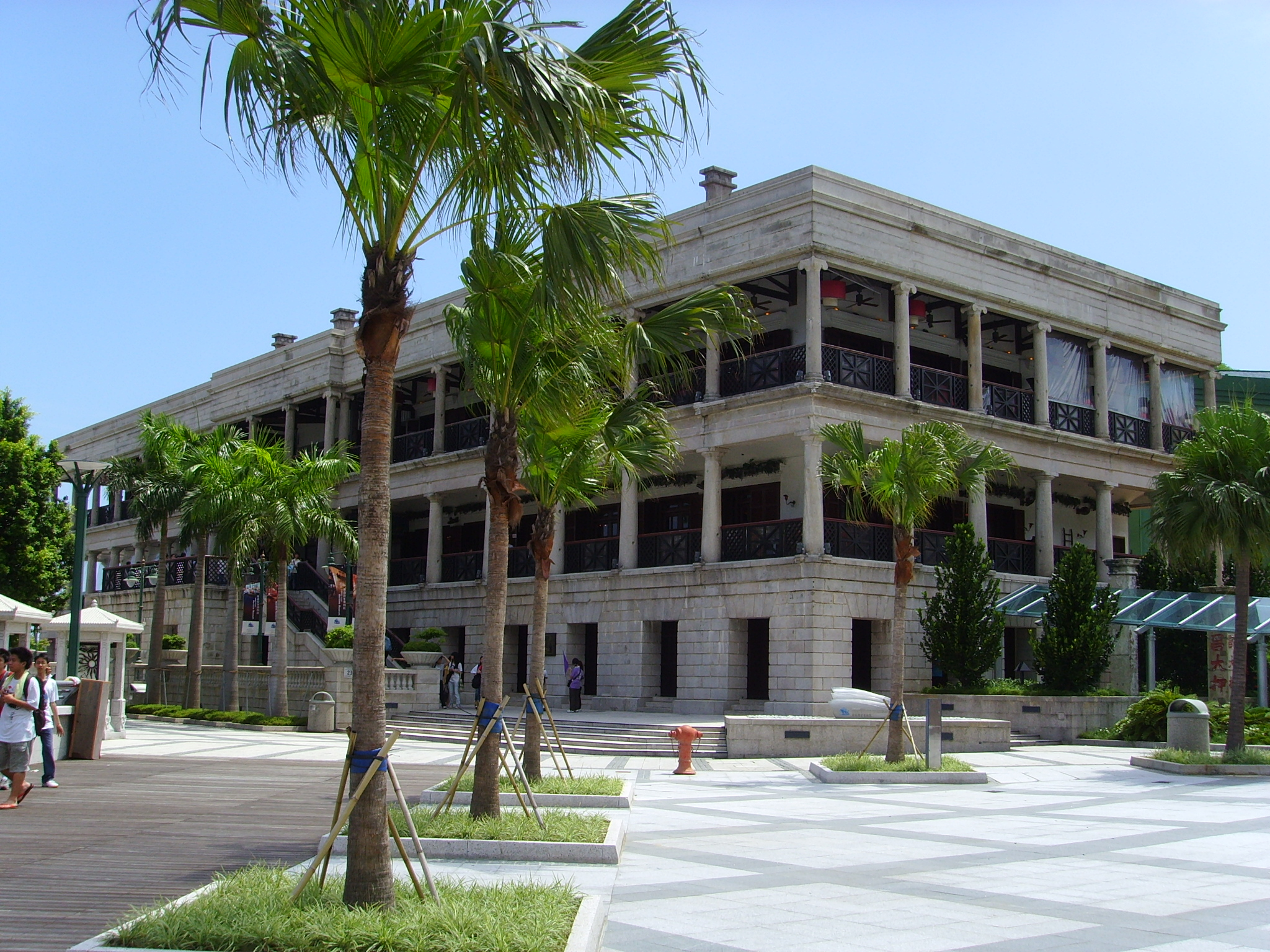 由海濱長廊攝向美利樓